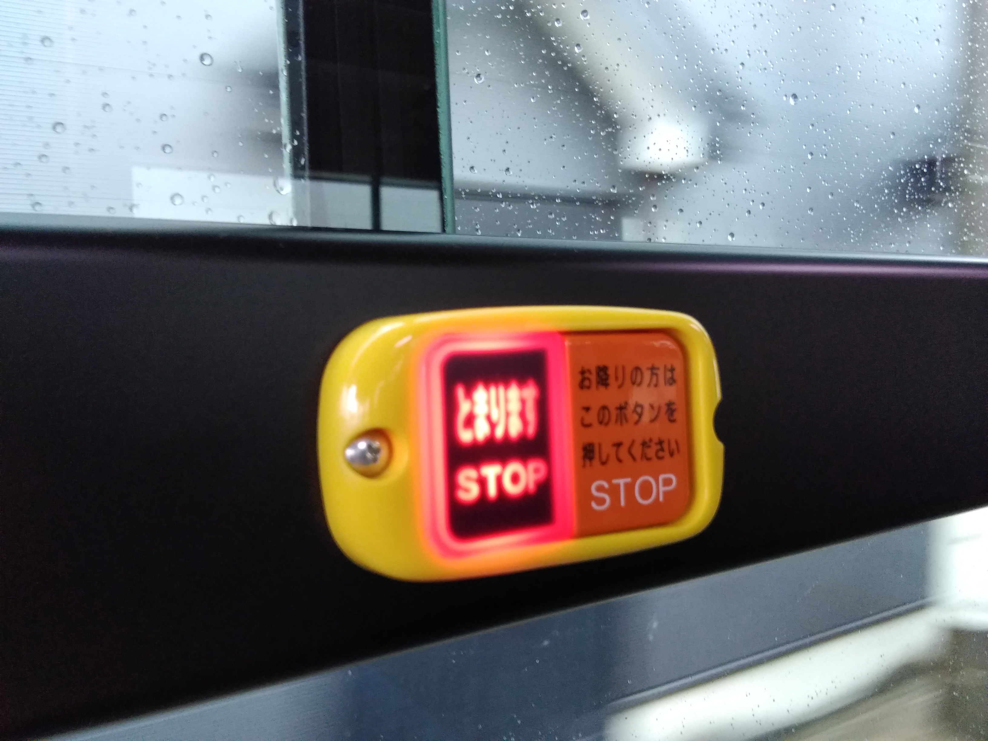 Ido: なはなはへ）ひねはひねねねりね